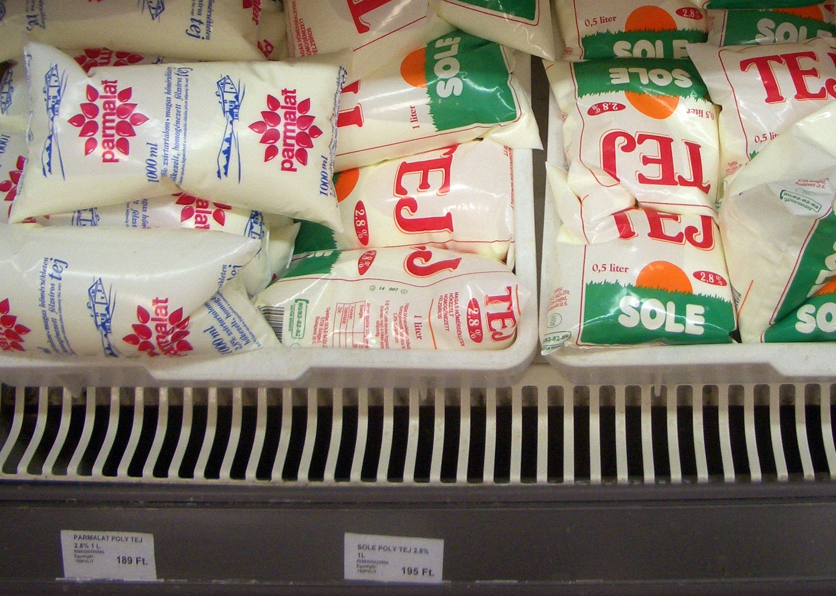 Bagged milk in Budapest, August 2006.